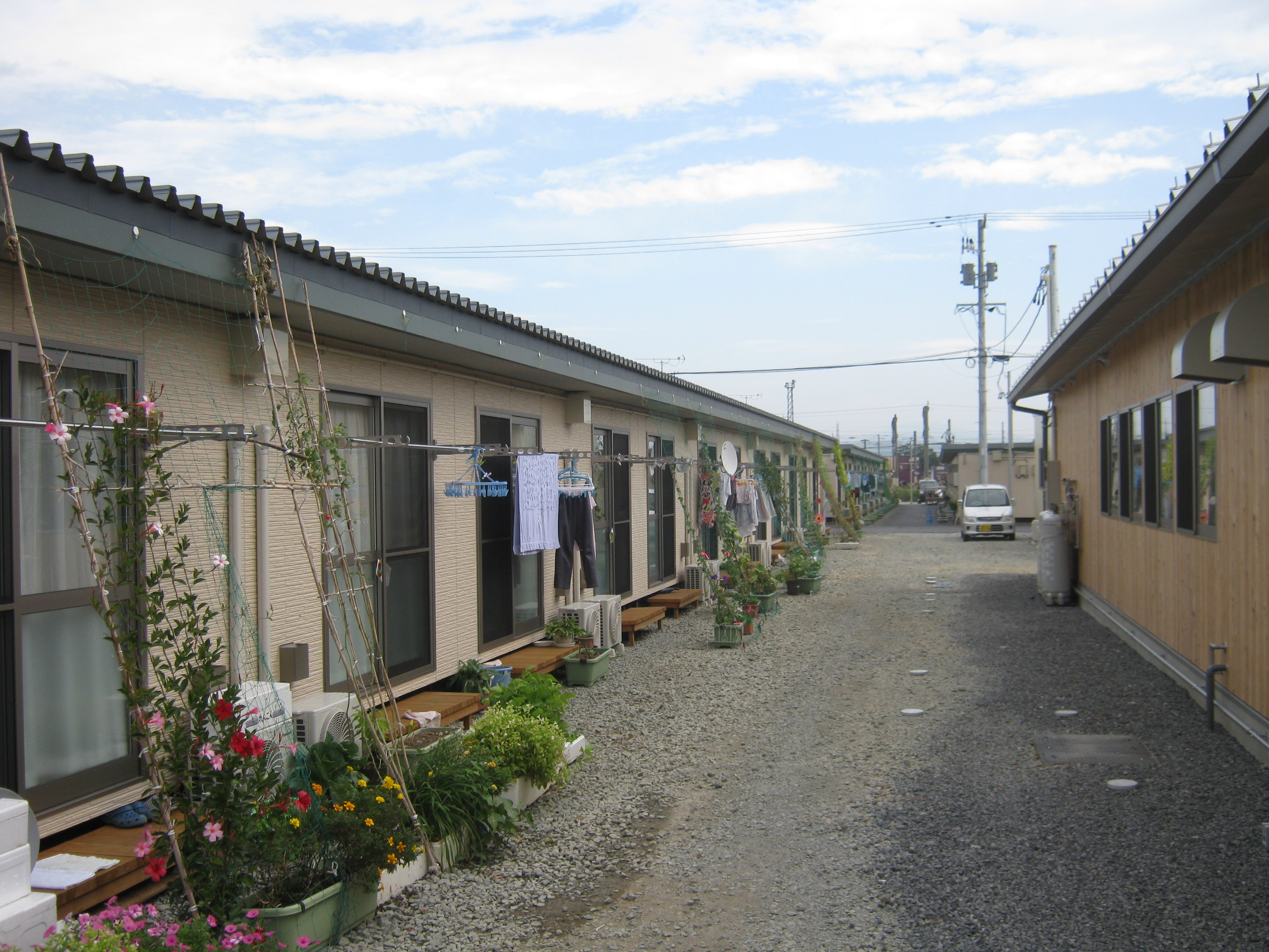 福島県郡山市内に設置された福島原子力発電所事故避難民向けの災害仮設住宅の様子。Panoramioより。